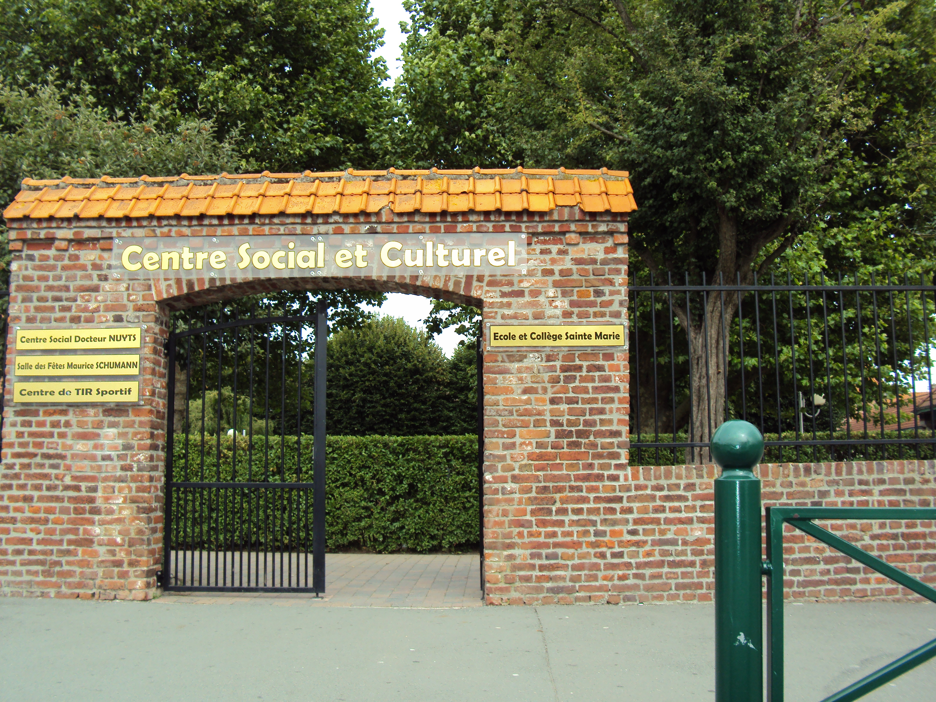 École & Collège Sainte-Marie2 à Pérenchies (Nord).